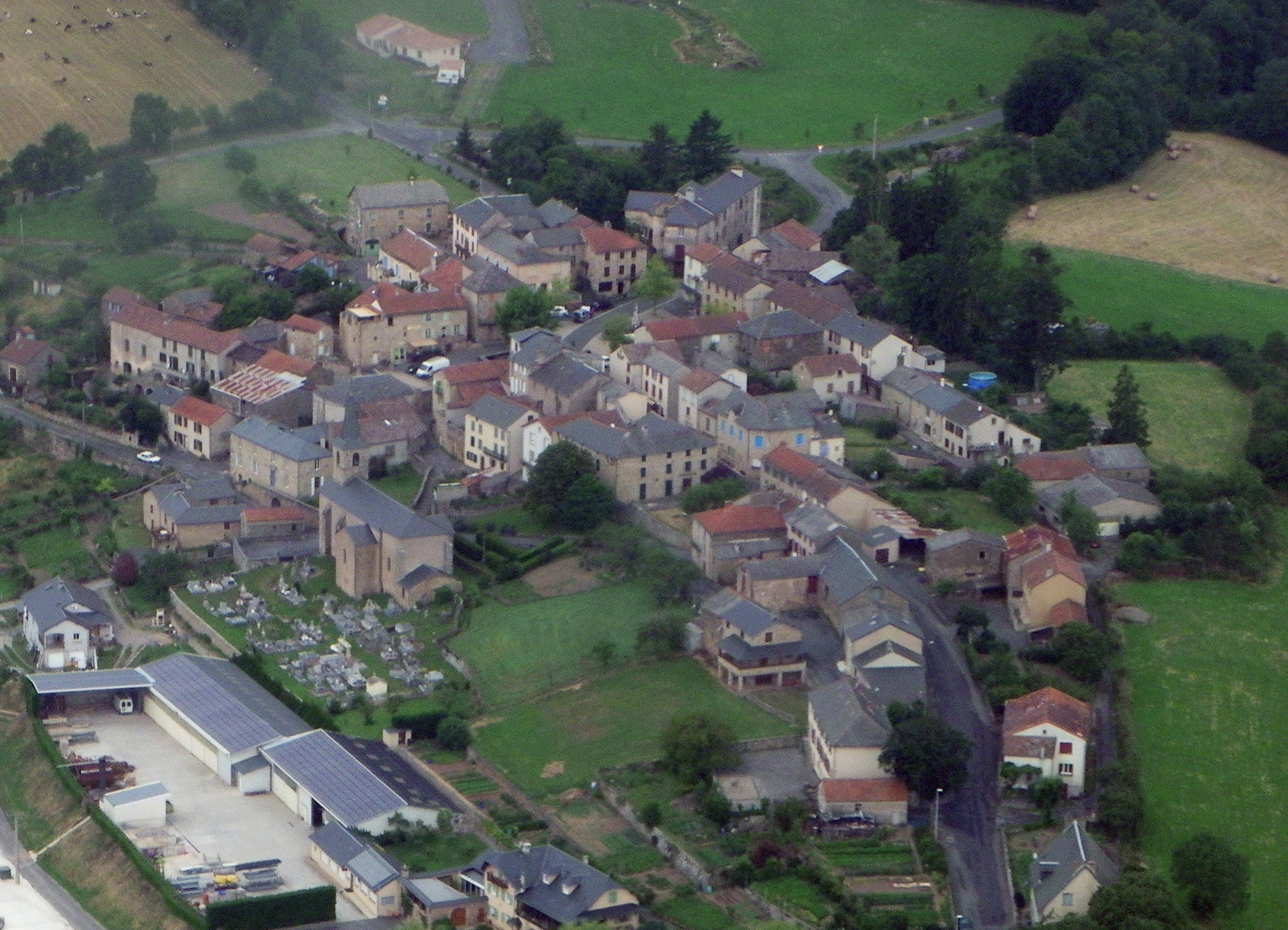 Vue aérienne du village de Montclar dans l'Aveyron (France)